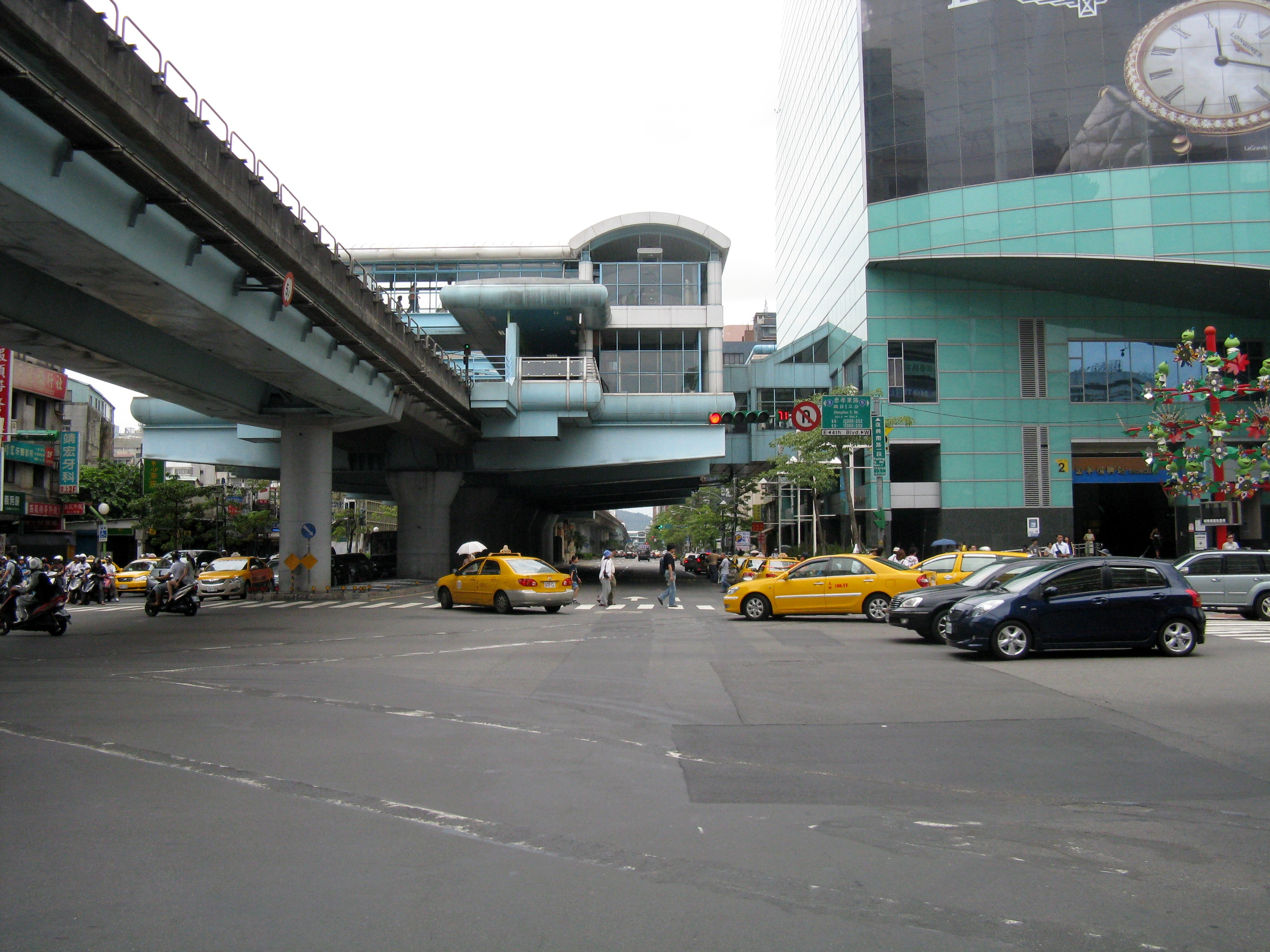 台北捷運文山線忠孝復興駅駅舎と太平洋そごう百貨台北復興館。